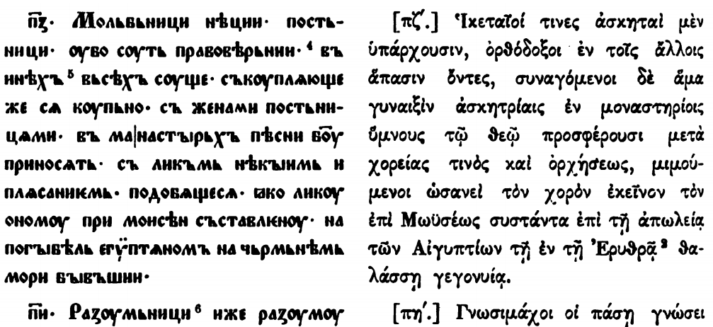 Икеты в книге В. Н. Бенешевича Древнеславянская кормчая XIV титулов без толкования. СПб, 1907. Т. 1.